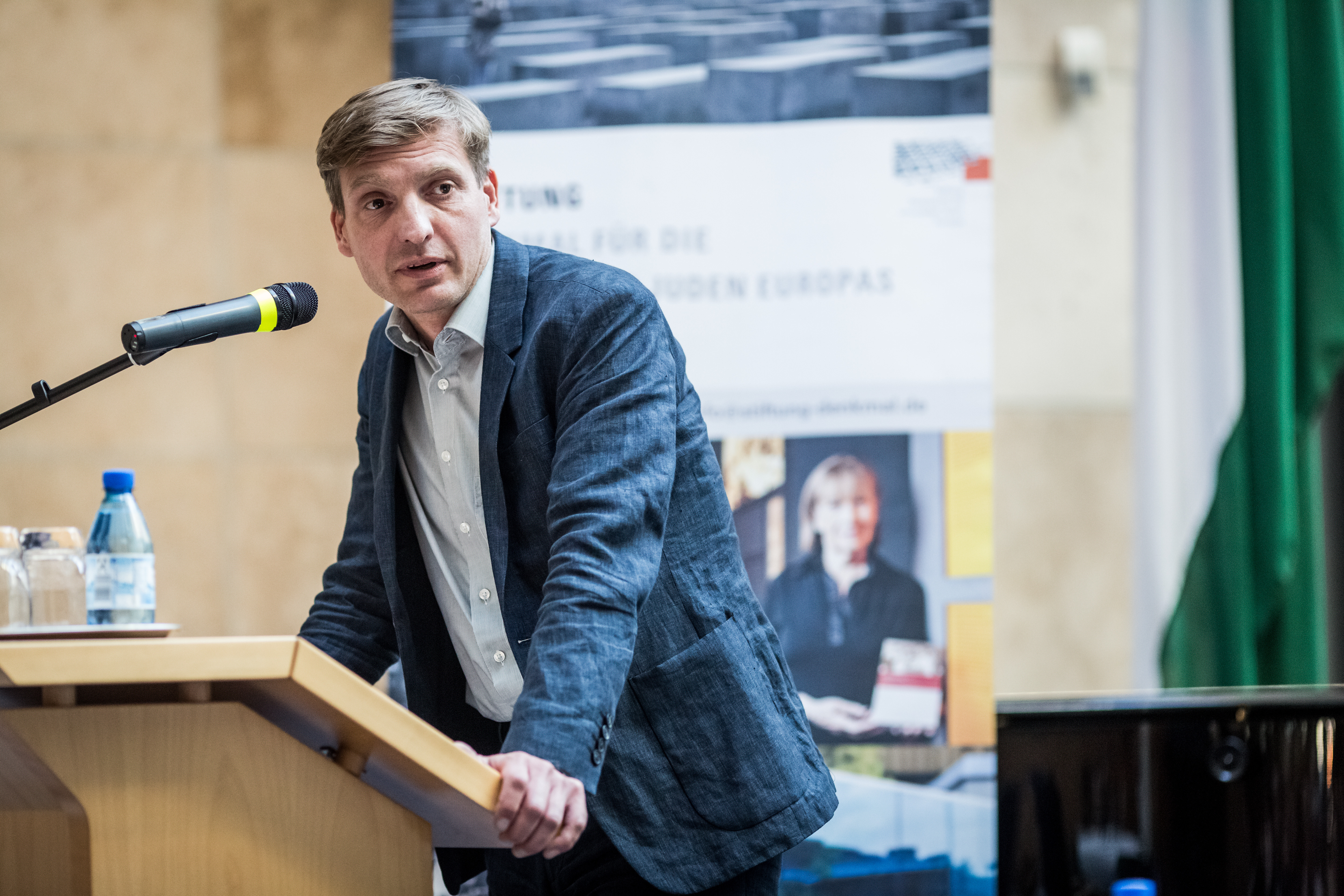 Uwe Neumärker. Foto: Stiftung Denkmal für die ermordeten Juden Europas